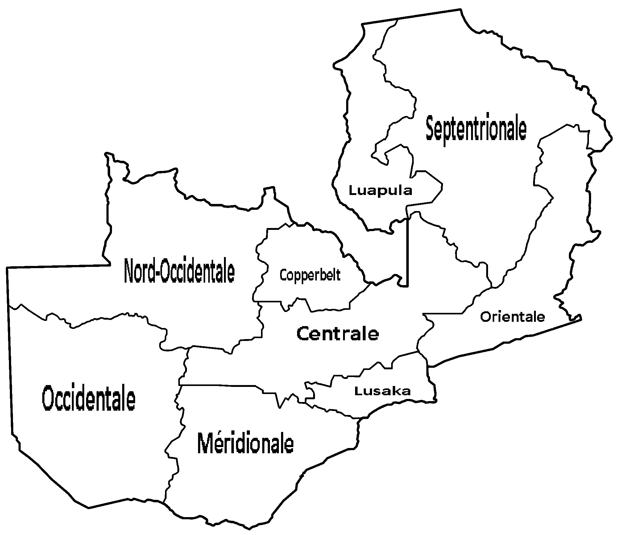 Provinces de Zambie en 2009